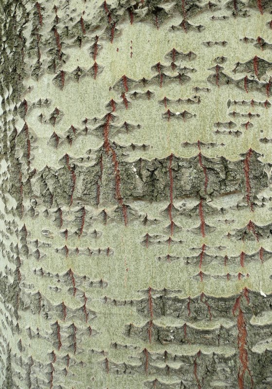 populus alba, bark